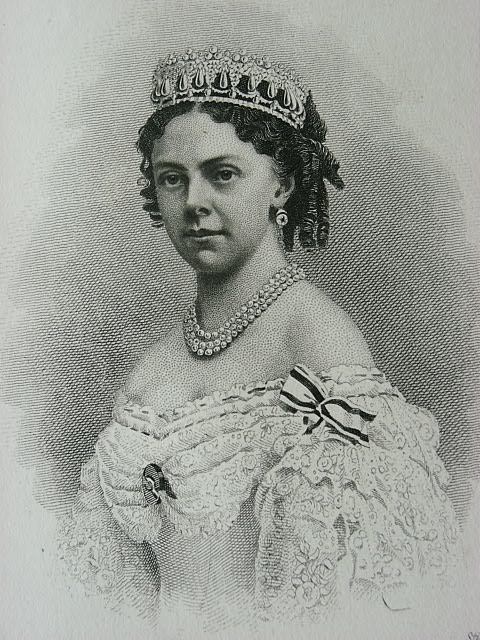 Portret van Alexandrine van Pruisen (1842-1906), vervaardigd omstreeks 1870; eventueel berustend auteursrecht is verlopen. Afbeelding komt in meerdere publicaties voor. Deze versie gevonden op alwaar het zonder auteursrechten gekopieerd mag worden.